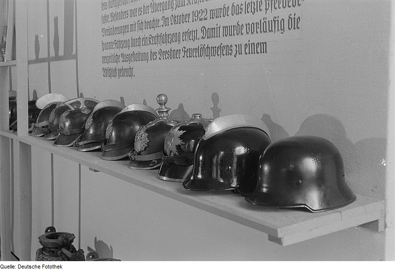 Original image description from the Deutsche Fotothek Sammlung historischer Feuerwehrhelme